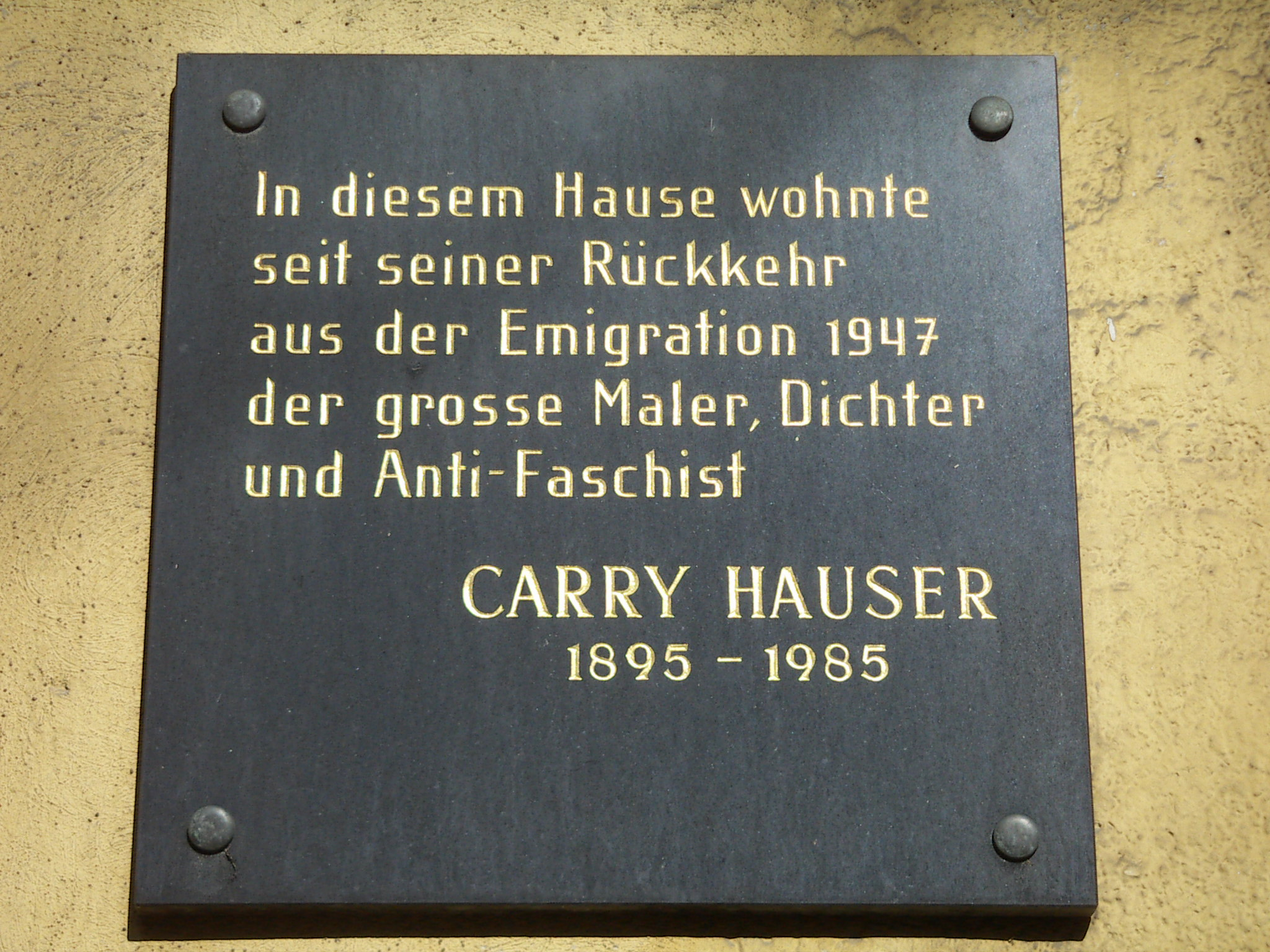 Gedenktafel zum Maler und Dichter Carry Hauser an seinem letzten Wohnhaus in Wien-Hietzing in der Maxingstraße 34